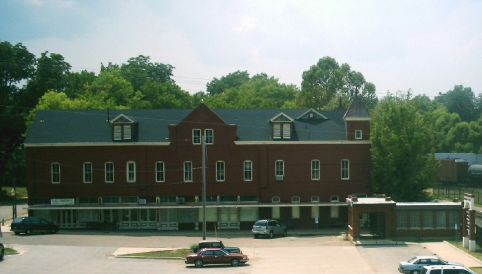 Ginocchio Hotel